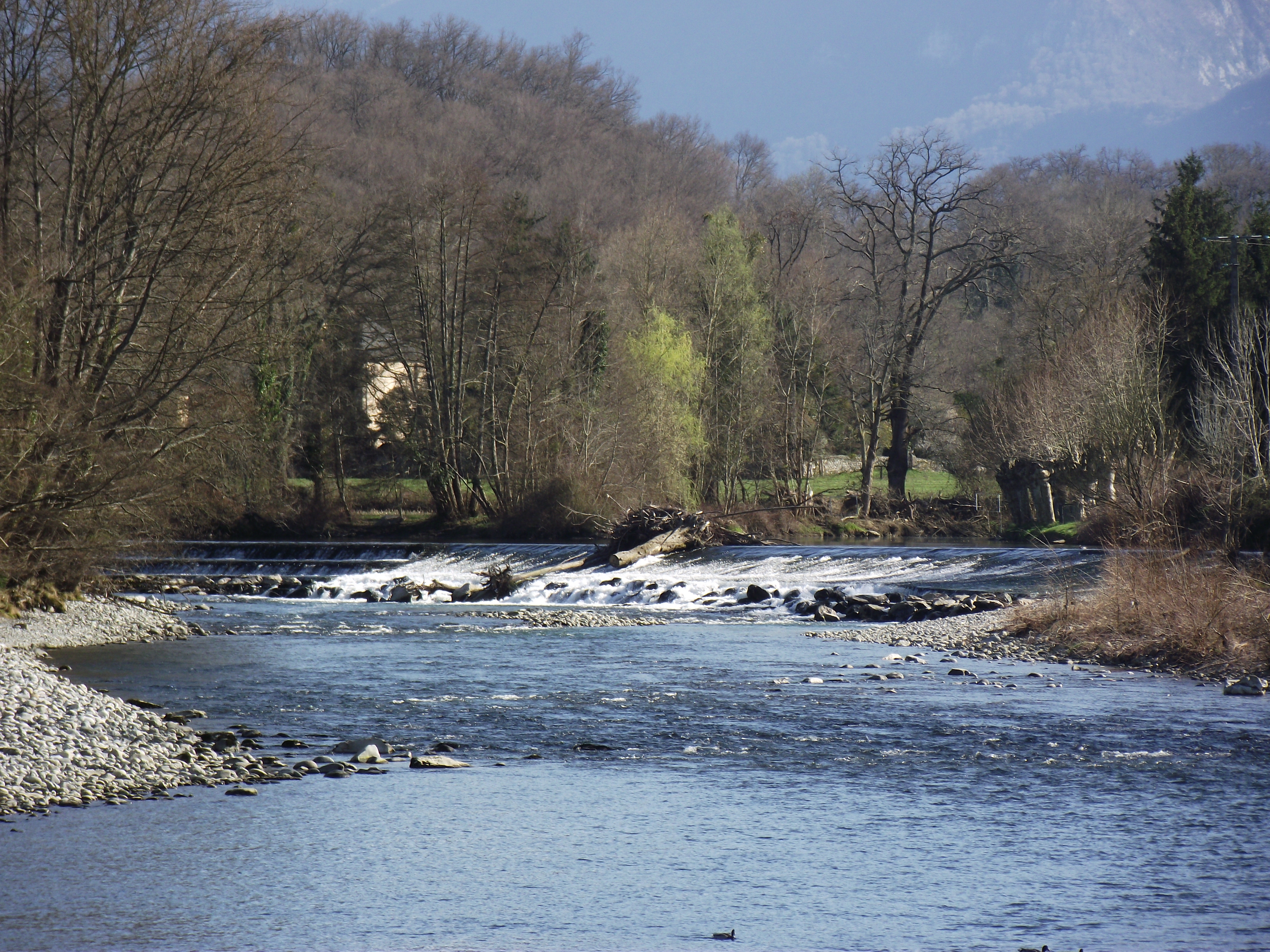 Gave à Nay (Pyrénées-Atlantiques, France)